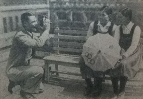 Joe E. Brown, when he visited Japan in 1924.